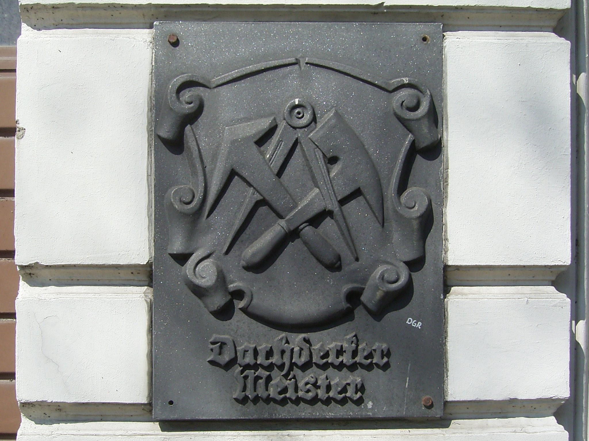 Friedrich-Engels-Allee 143 in Wuppertal